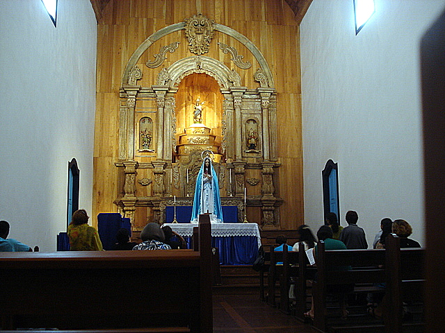 Setenário